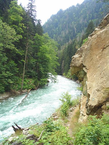 Долина реки Цахвоа, Кавказский государственный природный биосферный заповедник